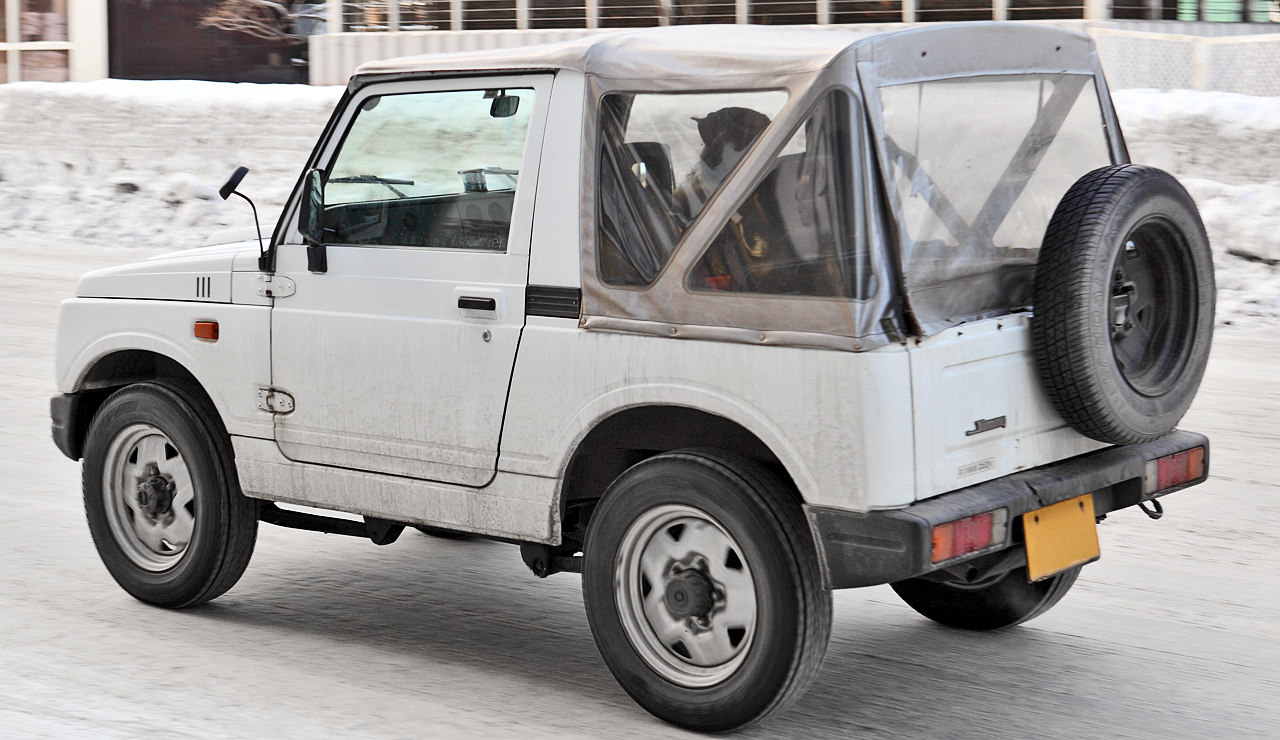 Suzuki Jimny 660 Softtop ( JA12C )